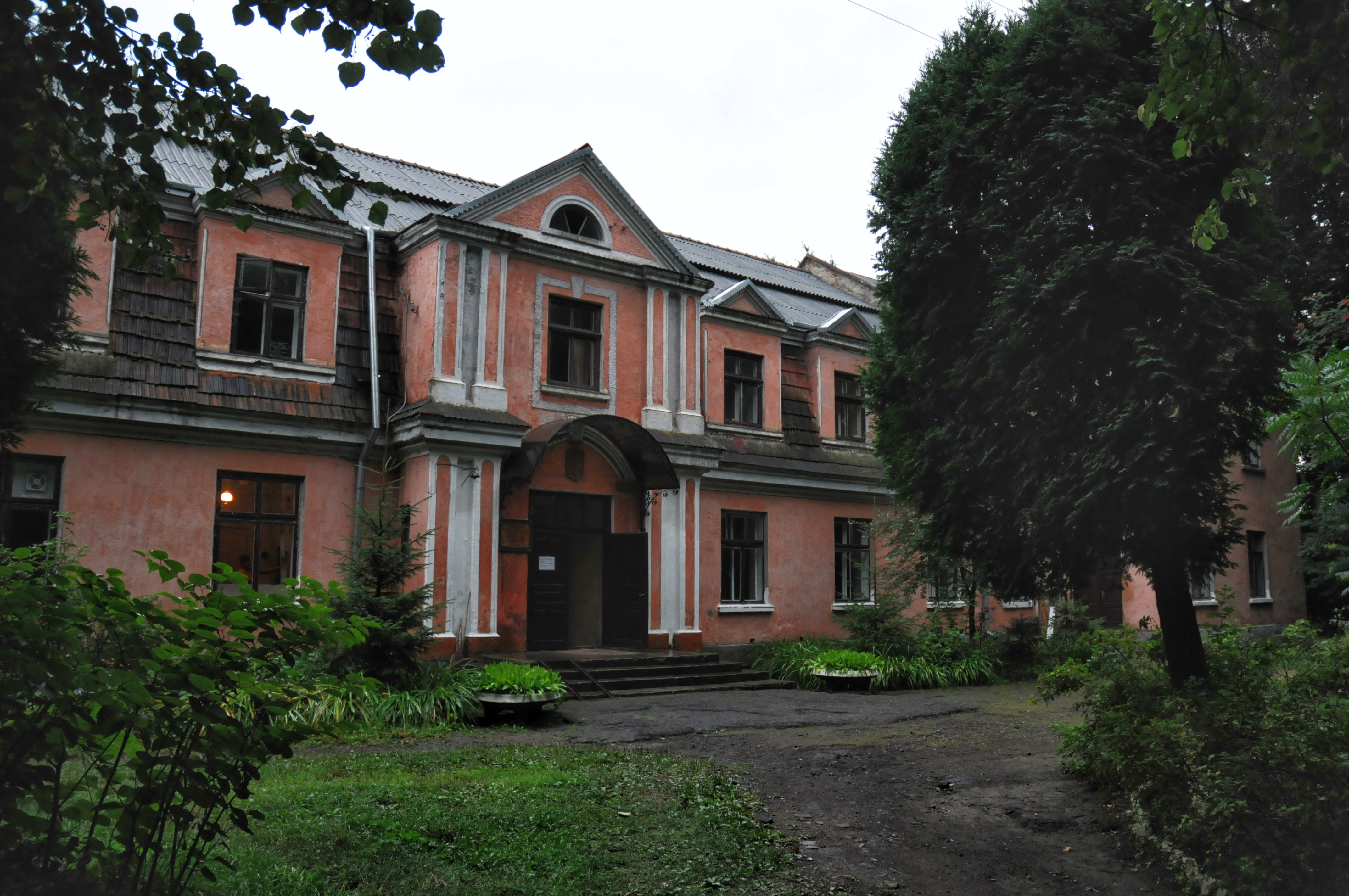 Скелівка (кол.Фельштин), палац, нині туберкульозний диспансер